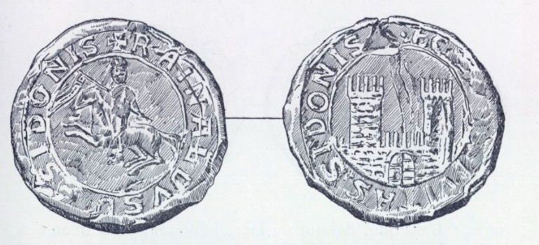 Reginald ze Sidonu